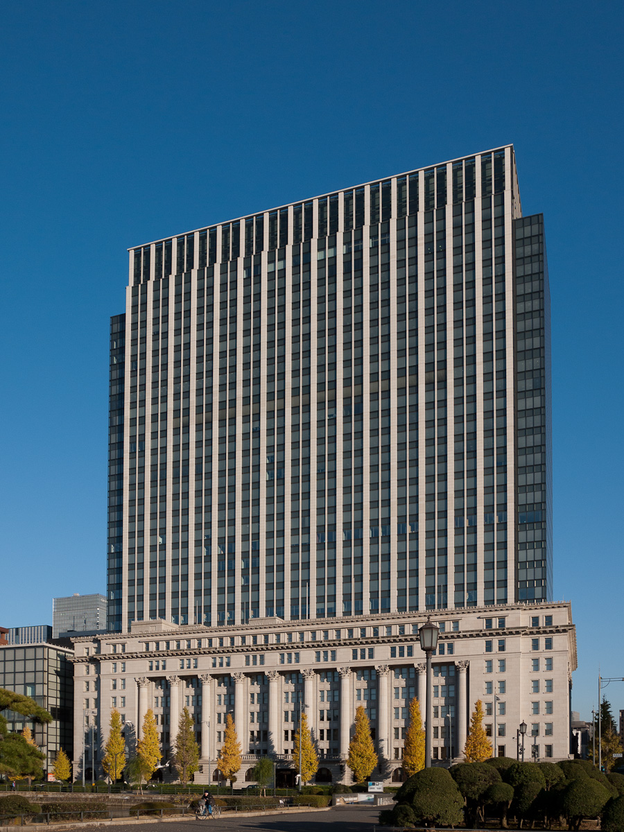 明治生命館、明治安田生命本社ビル。